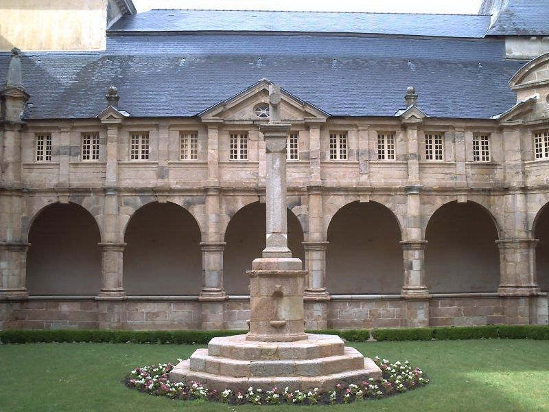 Cloître et galerie supérieure rue de Vannes